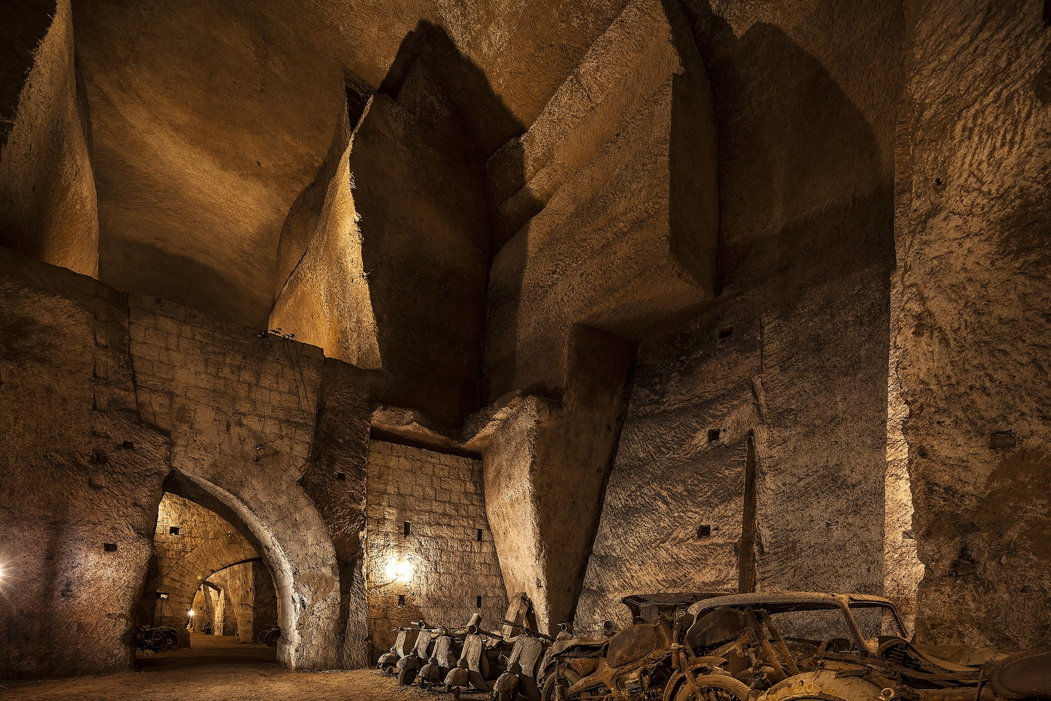 Rifugio. Galleria borbonica, Naples.